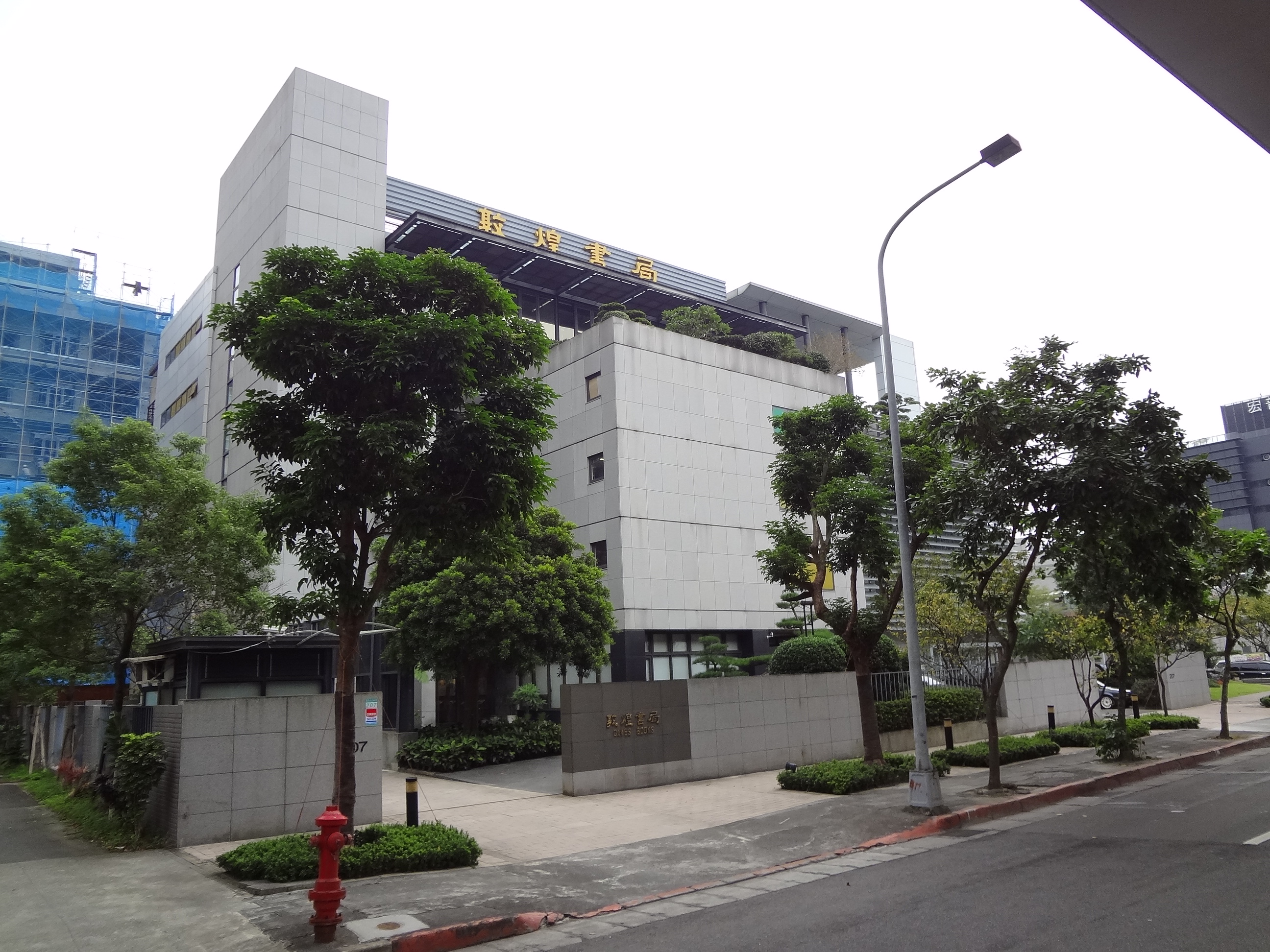 敦煌大樓，為敦煌書局總管理處，位於臺北市內湖區堤頂大道一段207號，1997年興建，2000年落成啟用。